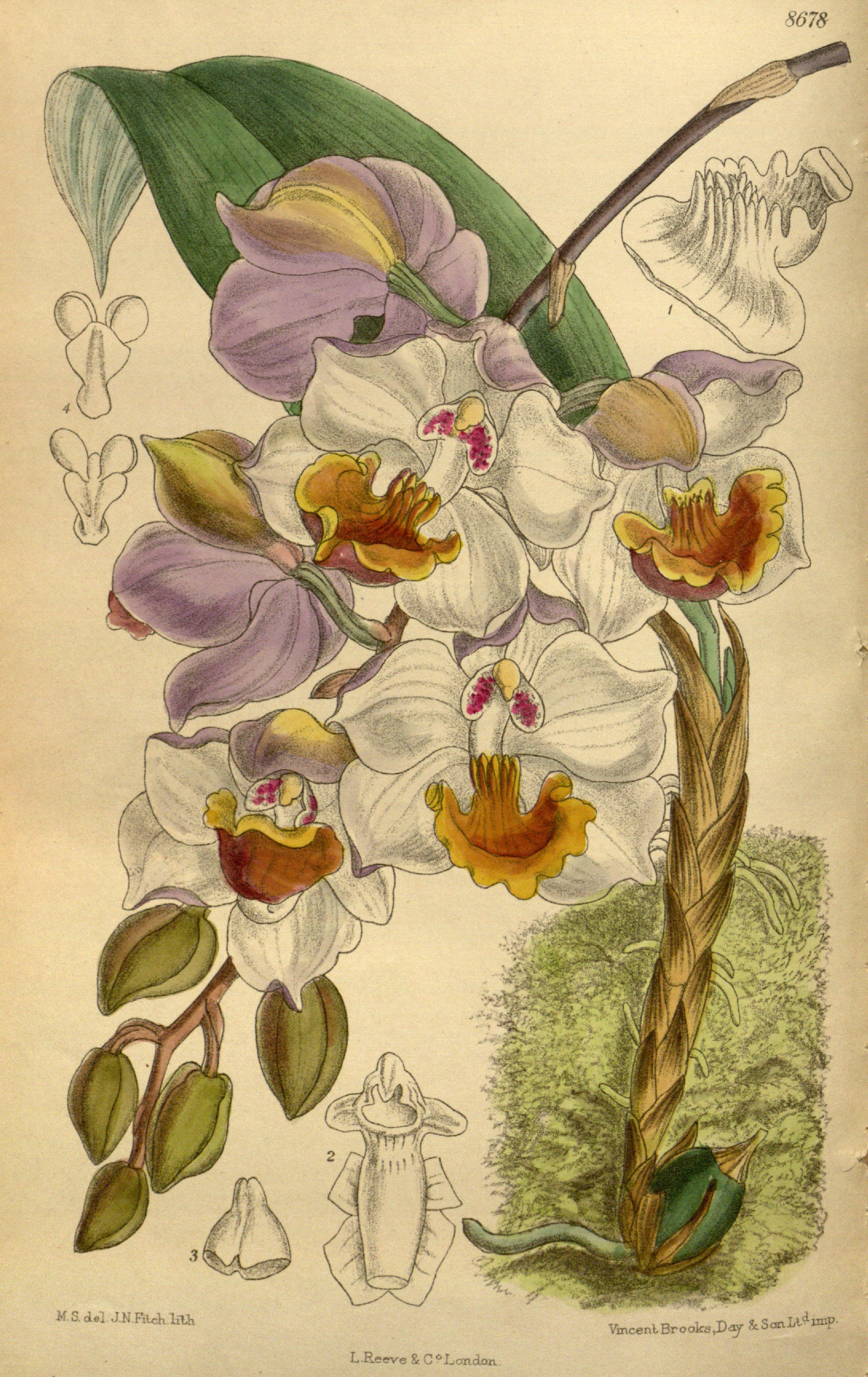 Acacallis cyanea (= Aganisia cyanea), Orchidaceae